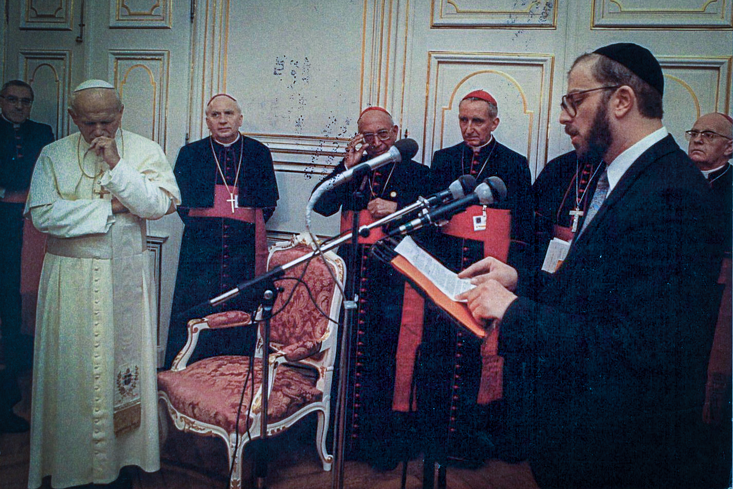 De gauche à droite, le Cardinal Jean Marie Lustiger, le pape Jean-Paul II, Mgr Charles-Amarin Brand, non identifié, le Cardinal Roger Etchegarray, le Grand-Rabbin René Gutman, non identifié